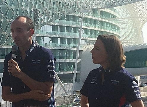 Kubica razem z Claire Williams podczas ogłoszenia Roberta drugim kierowcą Williamsa na sezon 2019